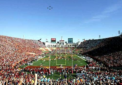 Source : "Image:Lamc2.jpg" sur wikipedia.en. (released under GNU FDL as part of Wikipedia.). Match de football américain de l'équipe universitaire des USC Trojans à domicile.